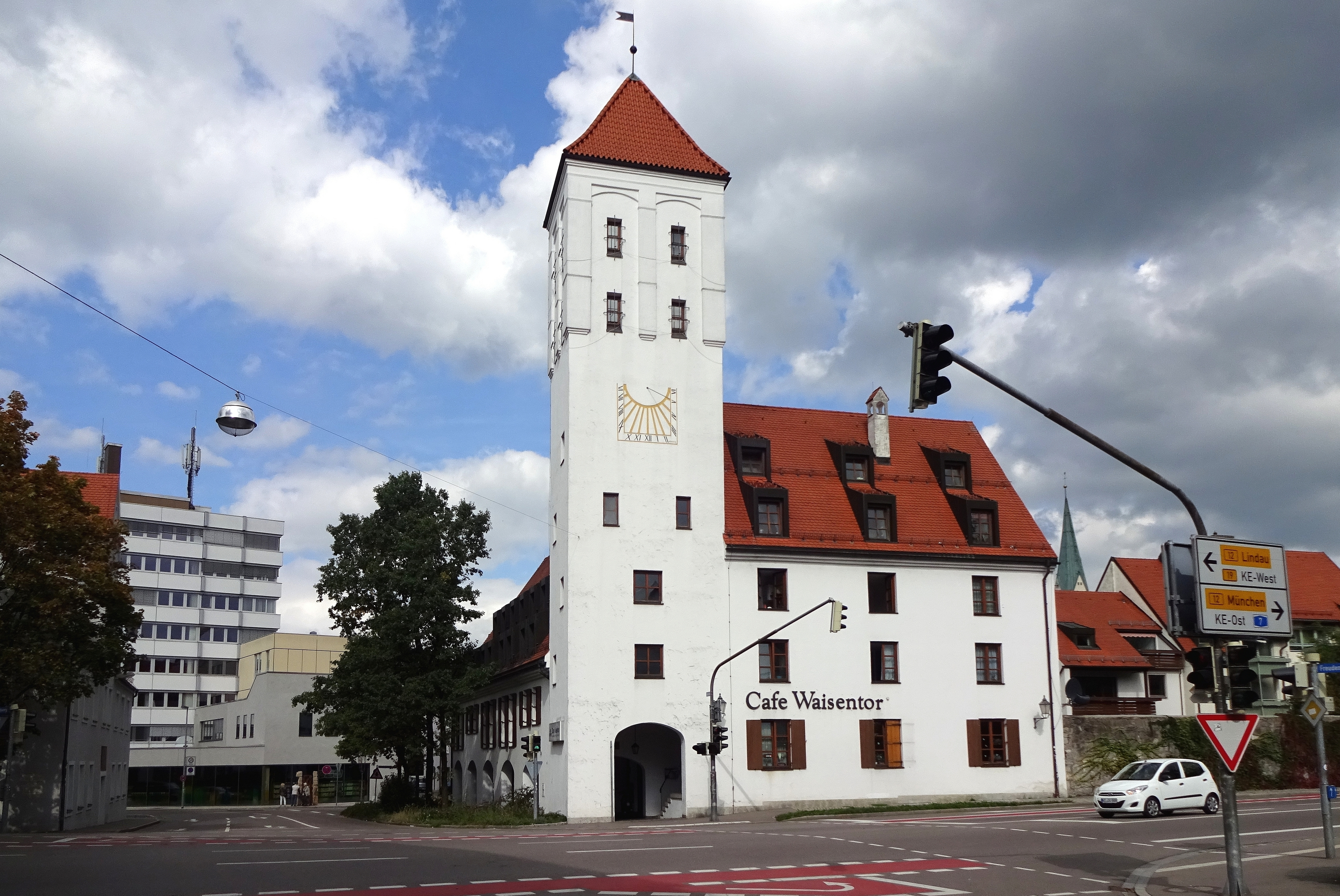 September 2015